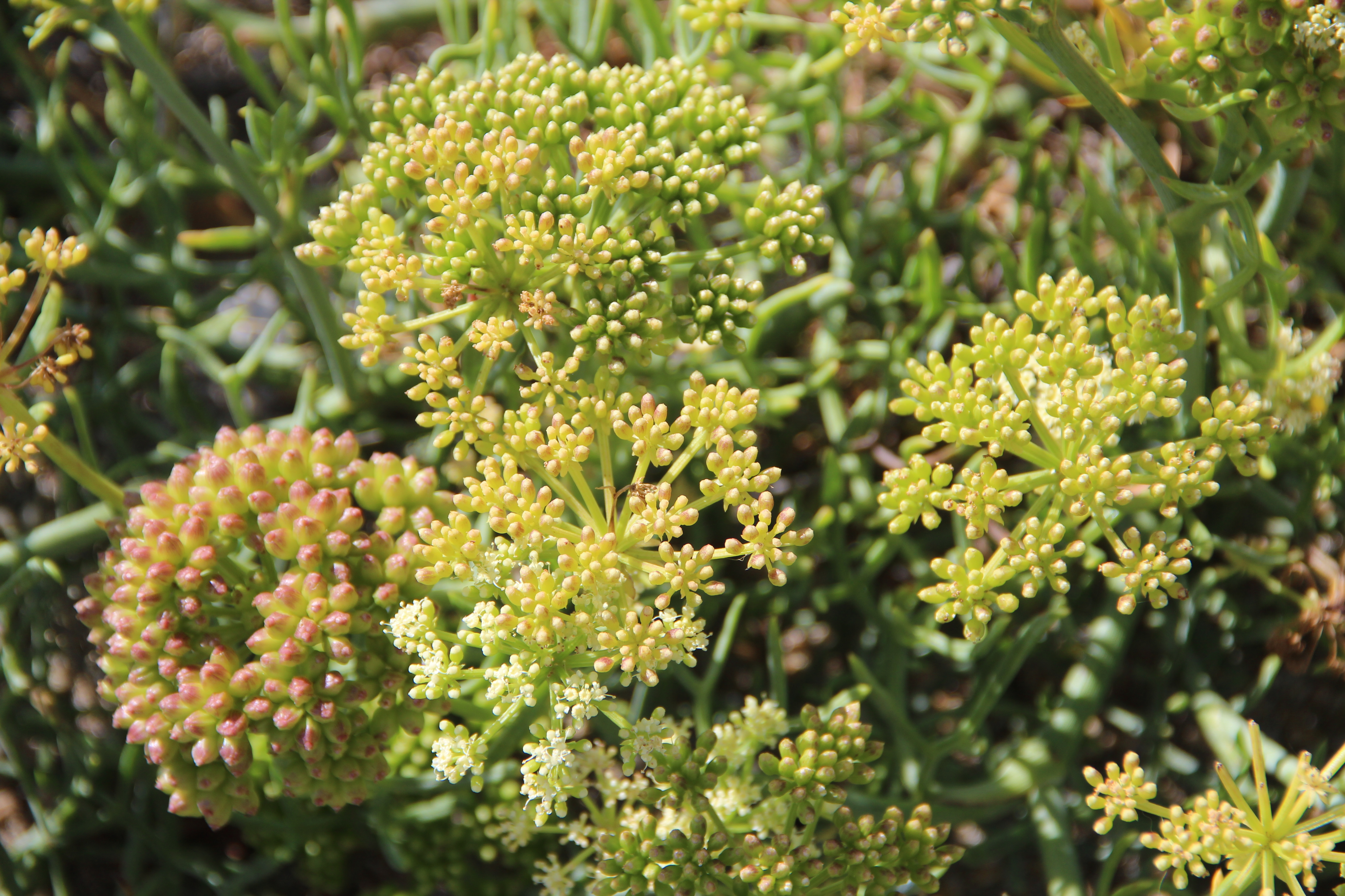 Criste marine, Crithme, Fenouil marin ou Perce-pierre (Crithmum maritimum) - Larmor-Plage (Morbihan, France).